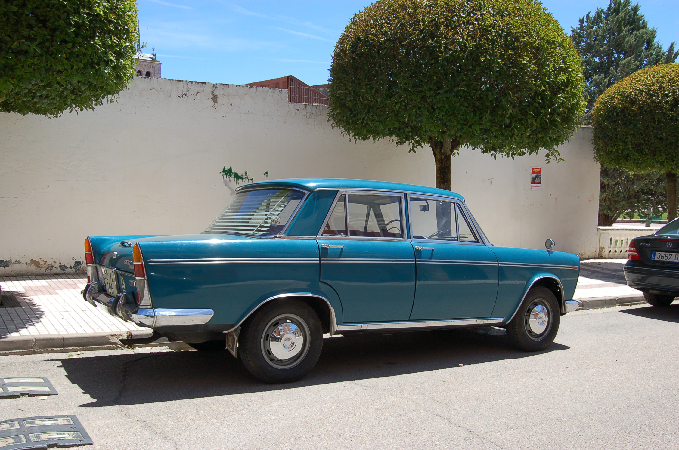 SEAT 1500 de 1970 en Roa (provincia de Burgos)